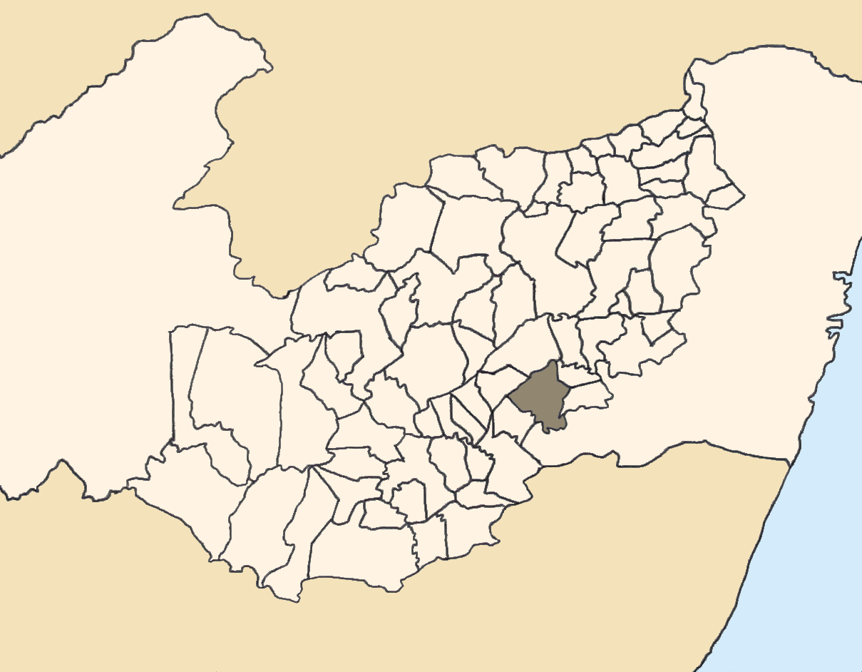 Mapa da mesorregião Agreste de Pernambuco (Brasil) subdivida em municípios. Em destaque, o município de Panelas. Map of the brazilian state of Pernambuco (mesorregião Agreste) showing the city of Panelas. Imagem tratada com o GIMP. Image made with GIMP.